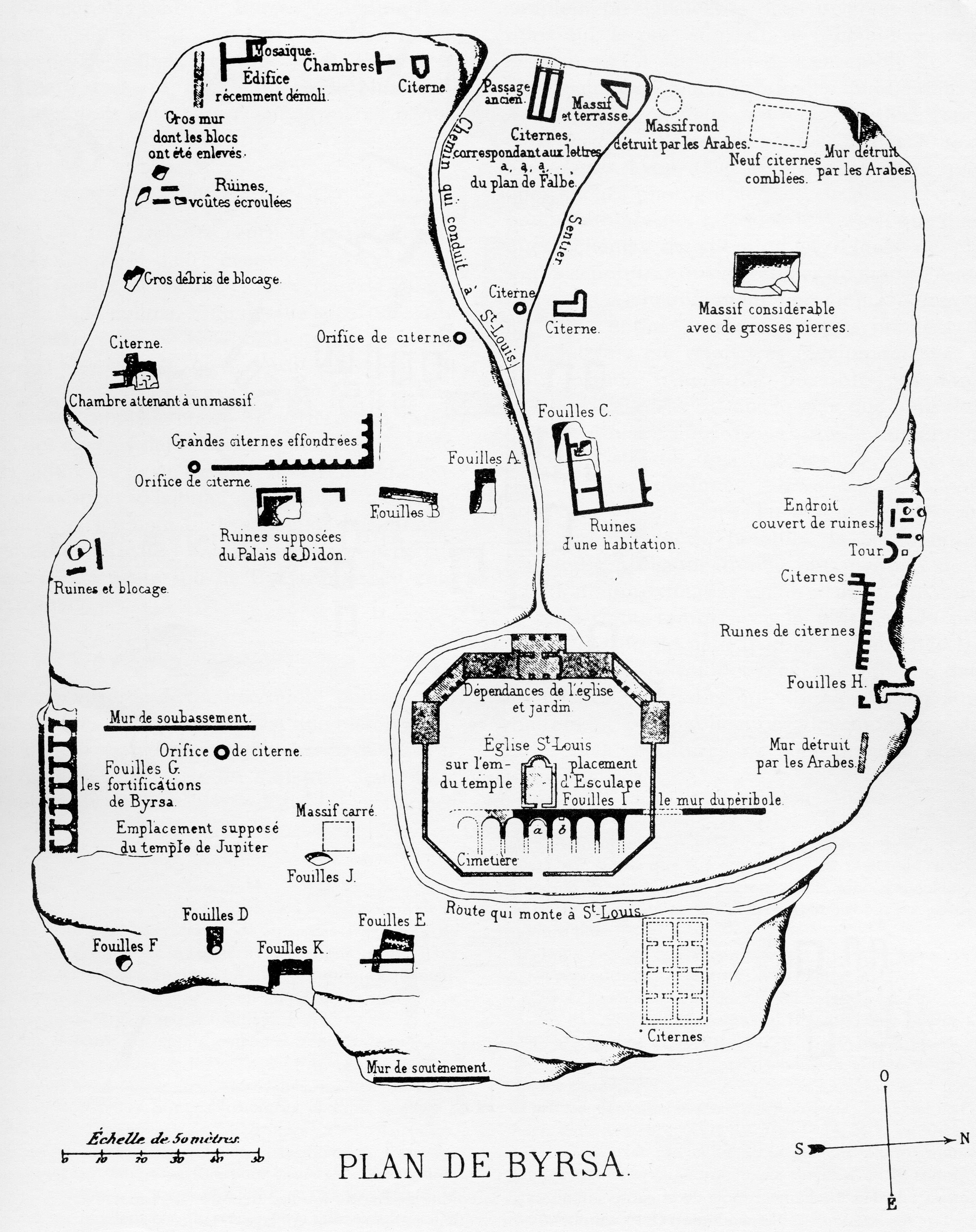 Plan des fouilles de Byrsa par Beulé en 1859, publié dans Fouilles à Carthage en 1861